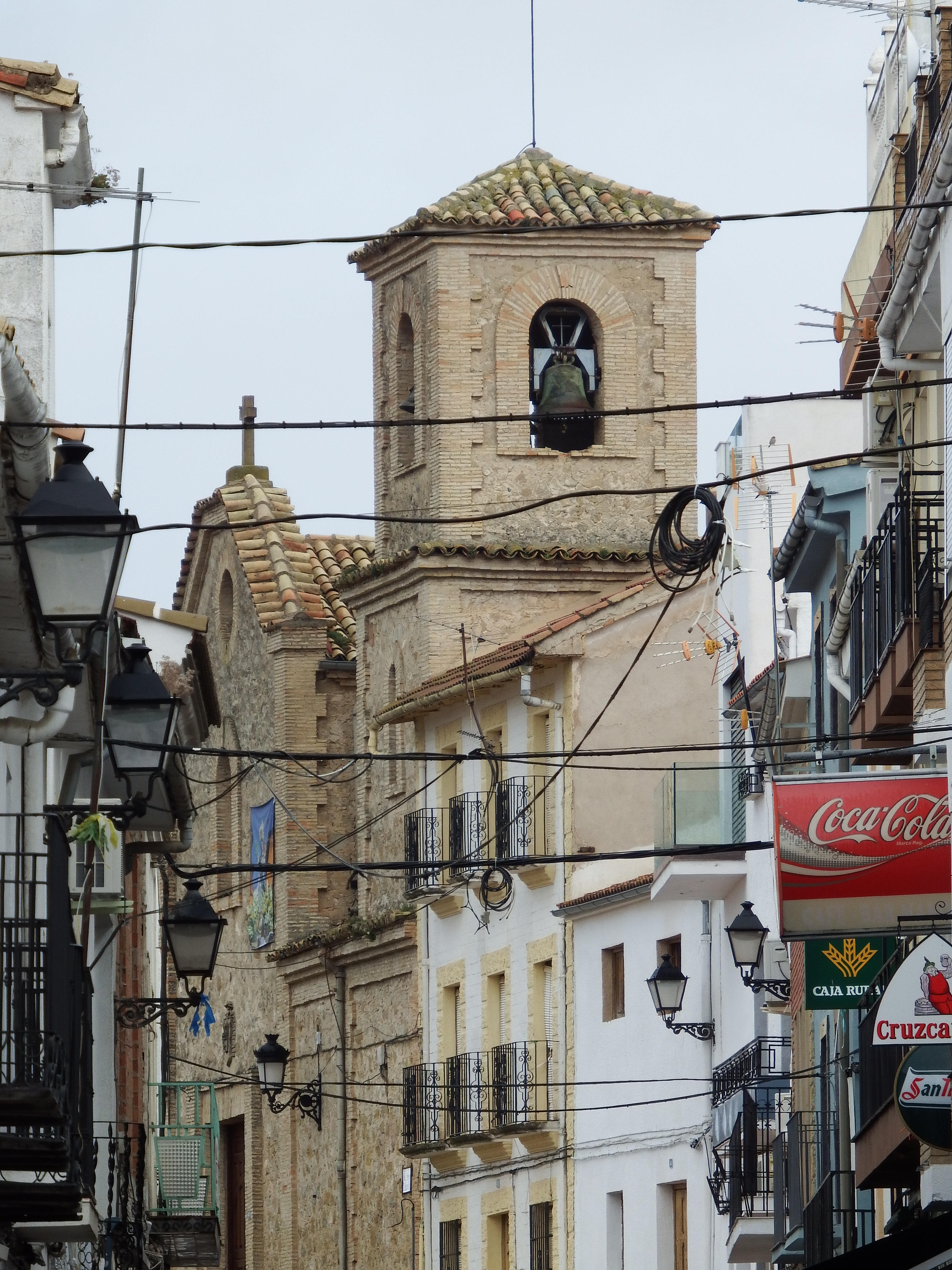 Chilluévar